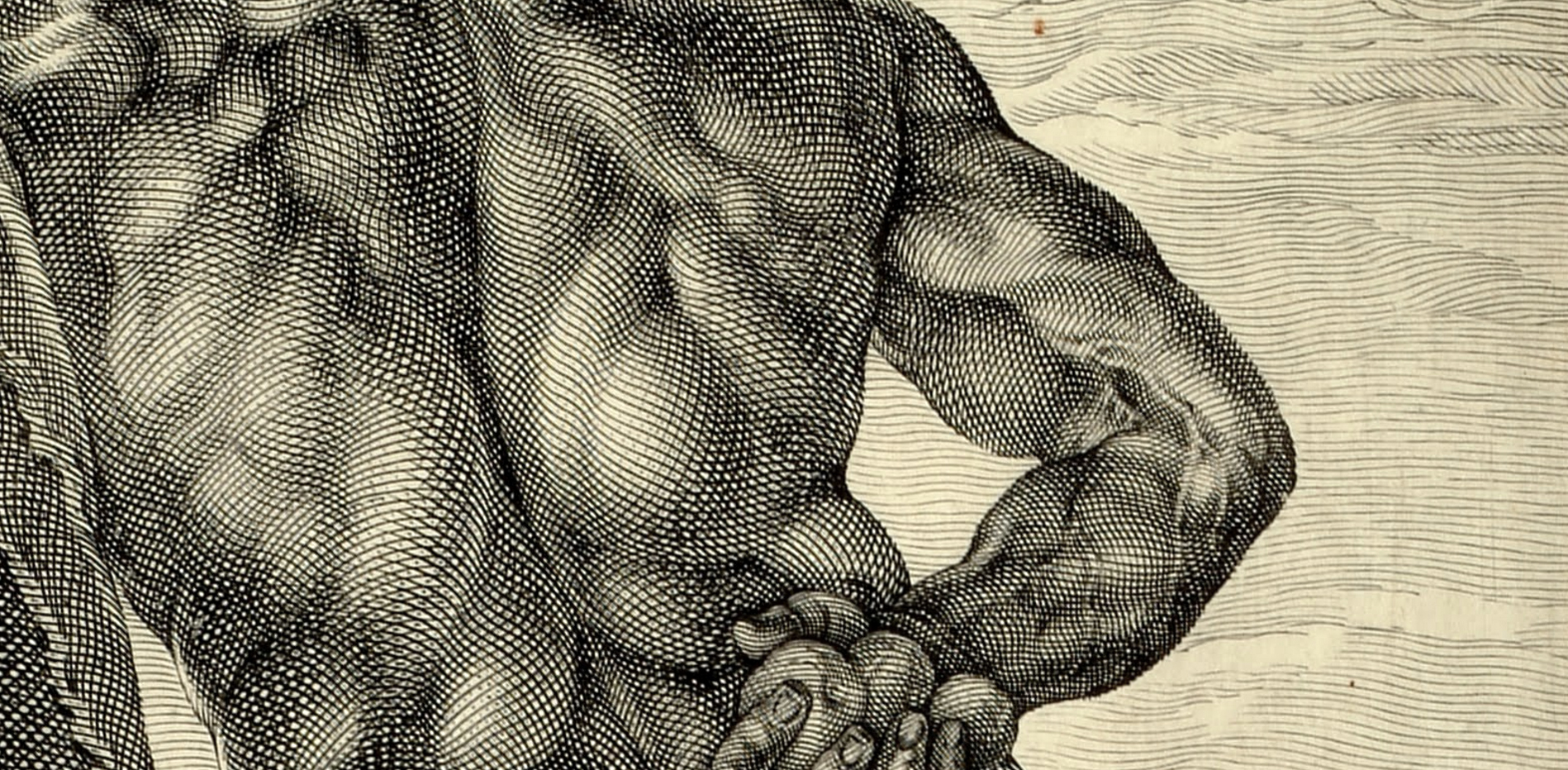 Hercules Farnese, detail